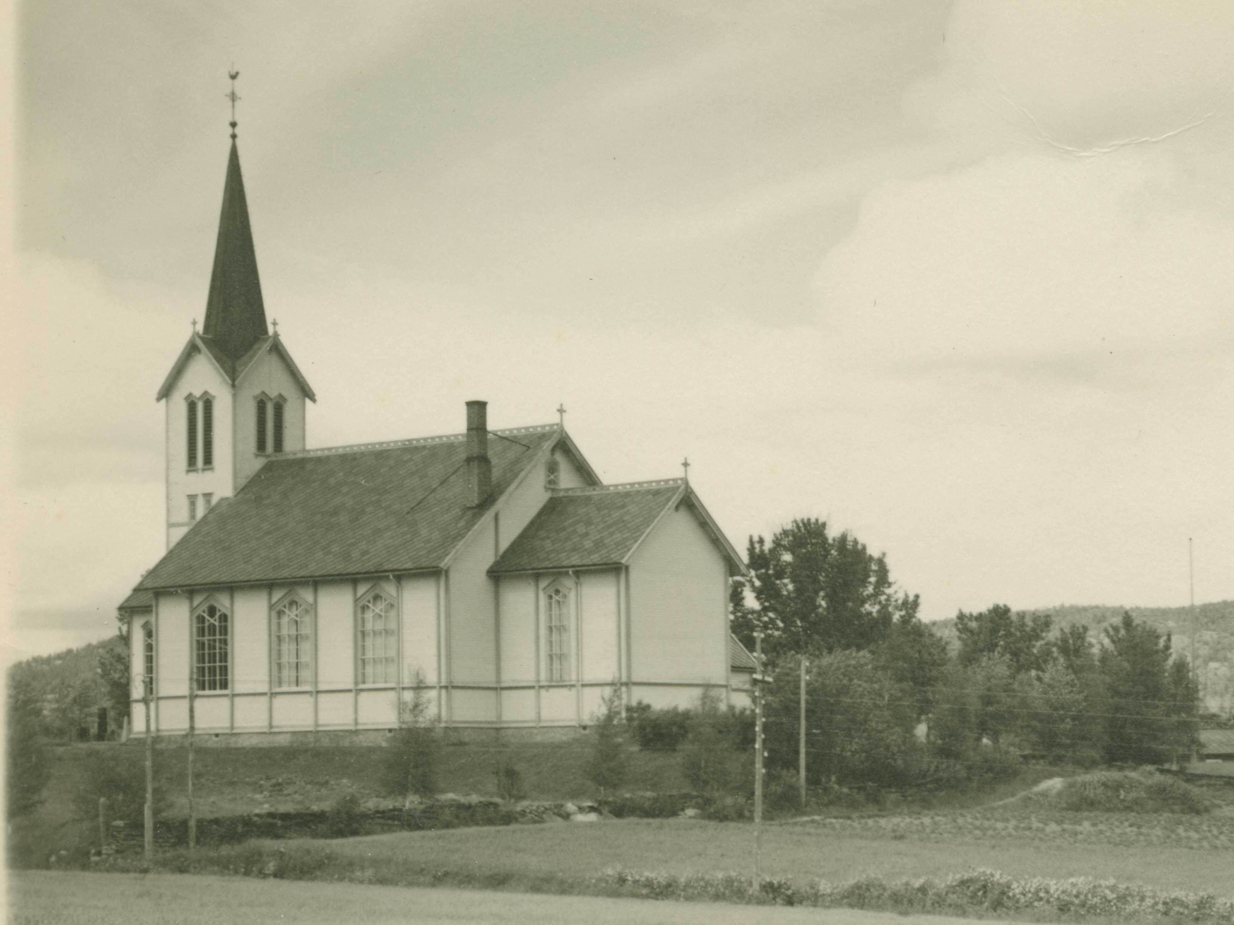 Åsen kirke (oppført 1904) og Heradshuset (oppført 1930), trolig på 1930-40-tallet. Fotograf / Photographer: Einar Einarsen Fotoeier / Photo owner: Guri og Olav Hegge Digitalisering / Digitizing: Arne Langås Foto-ID / Photo ID: 146-0009 Hvis bildet gjengis i andre sammenhenger, oppgi Åsen Museum og Historielag, fotoeier og fotograf som kildereferanse. Har du utfyllende opplysninger? Legg gjerne igjen en kommentar nedenfor eller send e-post til . | If you re-use this photo, please refer to Åsen Museum og Historielag, the photographer and the owner of the photo. Do you have additional information? Please leave a comment or send an e-mail to .